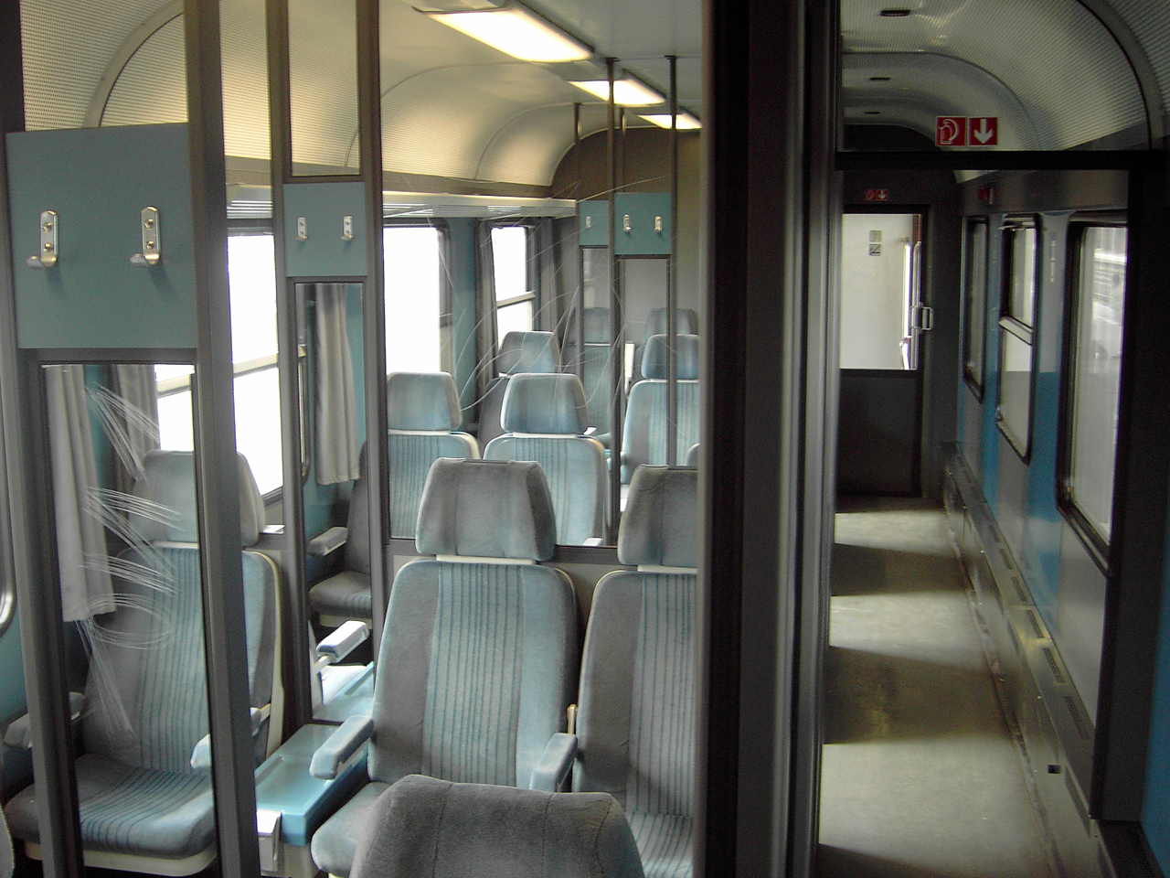 1.-Klasse-Abteil eines Umbau-Silberlings des Typs ABn 417 (OFV-Design)